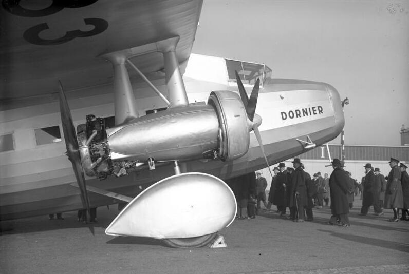 Ein neuer deutscher Luftriese ! Das neue deutsche Grossflugzeug "Do K" wurde zum ersten Mal den Behörden und Pressevertretern auf dem Flughafen Tempelhof in Berlin öffentlich vorgeführt. Das Flugzeug hat eine besondere Construktion, um den Luftwiderstand besser zu überwinden. Der Rumpf ist nach Zeppelinform gebaut und bietet in seinem Innern 10 Passagieren Platz. Die 4 Motoren haben eine Stundengeschwindigkeit vbis zu 250 km. Die eigenartige neue Motoren-Anlage am Rumpf des "Do K". Die Räder haben Verkleidung zur besseren Ueberwindung des Luftwiderstandes.